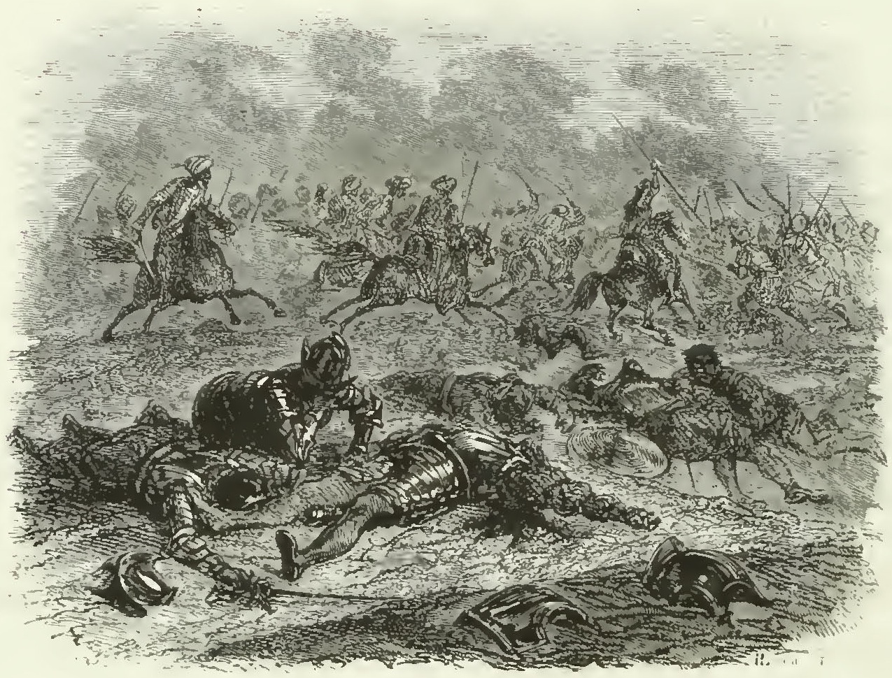 Expédition de Charles-Quint contre Alger